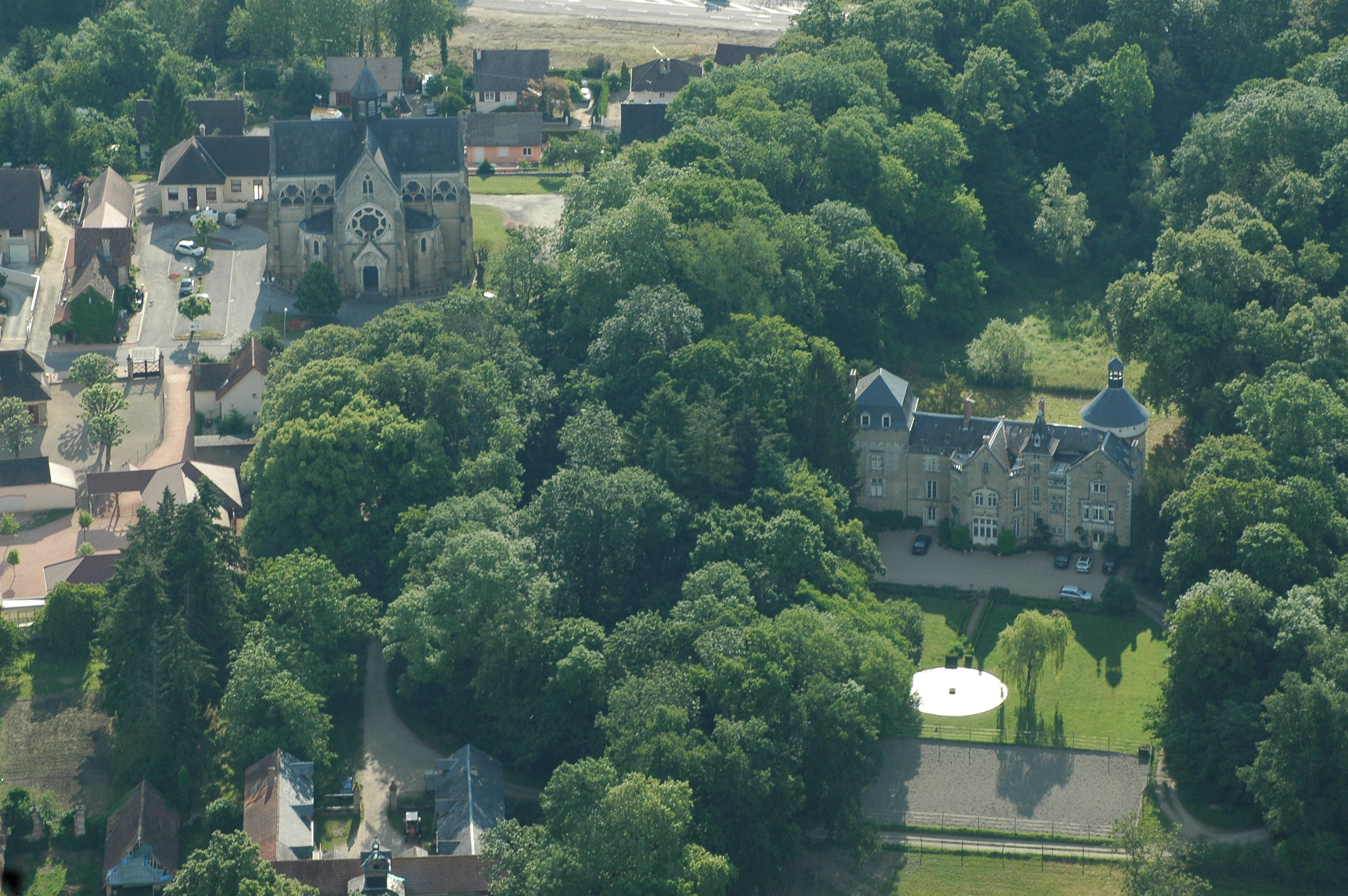 Église et château de Bressolles, Allier, France.